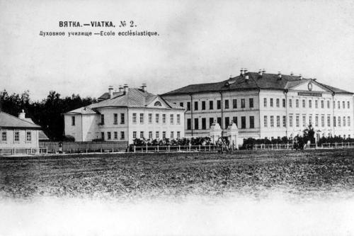 Здание Вятского духовного училища